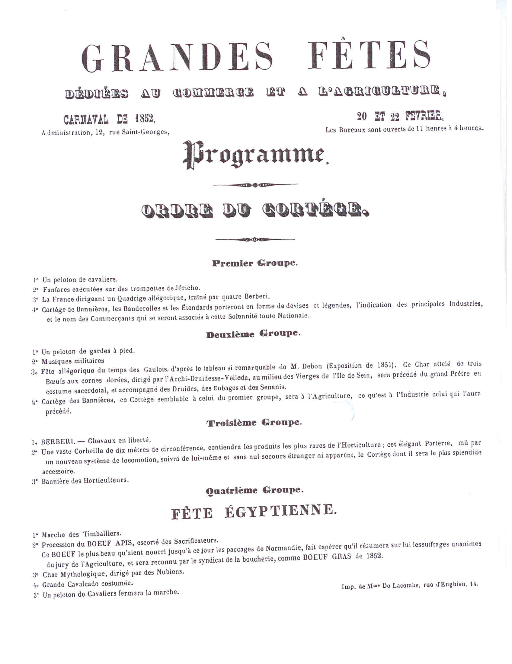 Programme annonçant le défilé du Bœuf Gras au Carnaval de Paris 1852. Les dates indiquées sont erronées. Le cortège est sorti en tous cas le lundi 23 février 1852, voir Le Nouvelliste daté de ce jour.